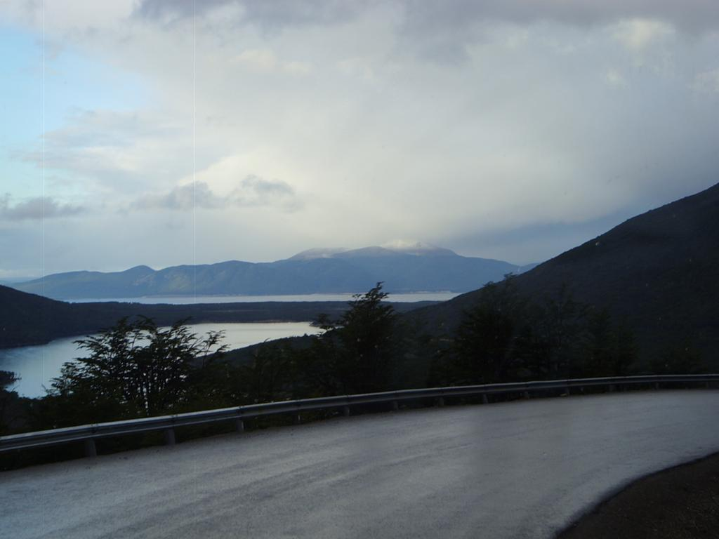 Fagnano Lake, Tierra del Fuego, Argentina